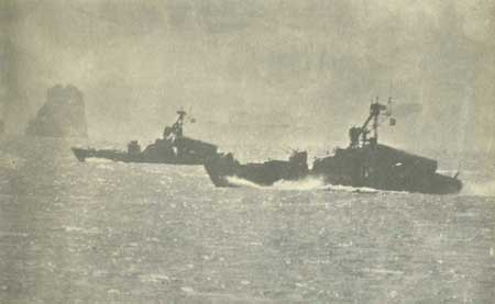 Vietnamese Navy Komar corvettes